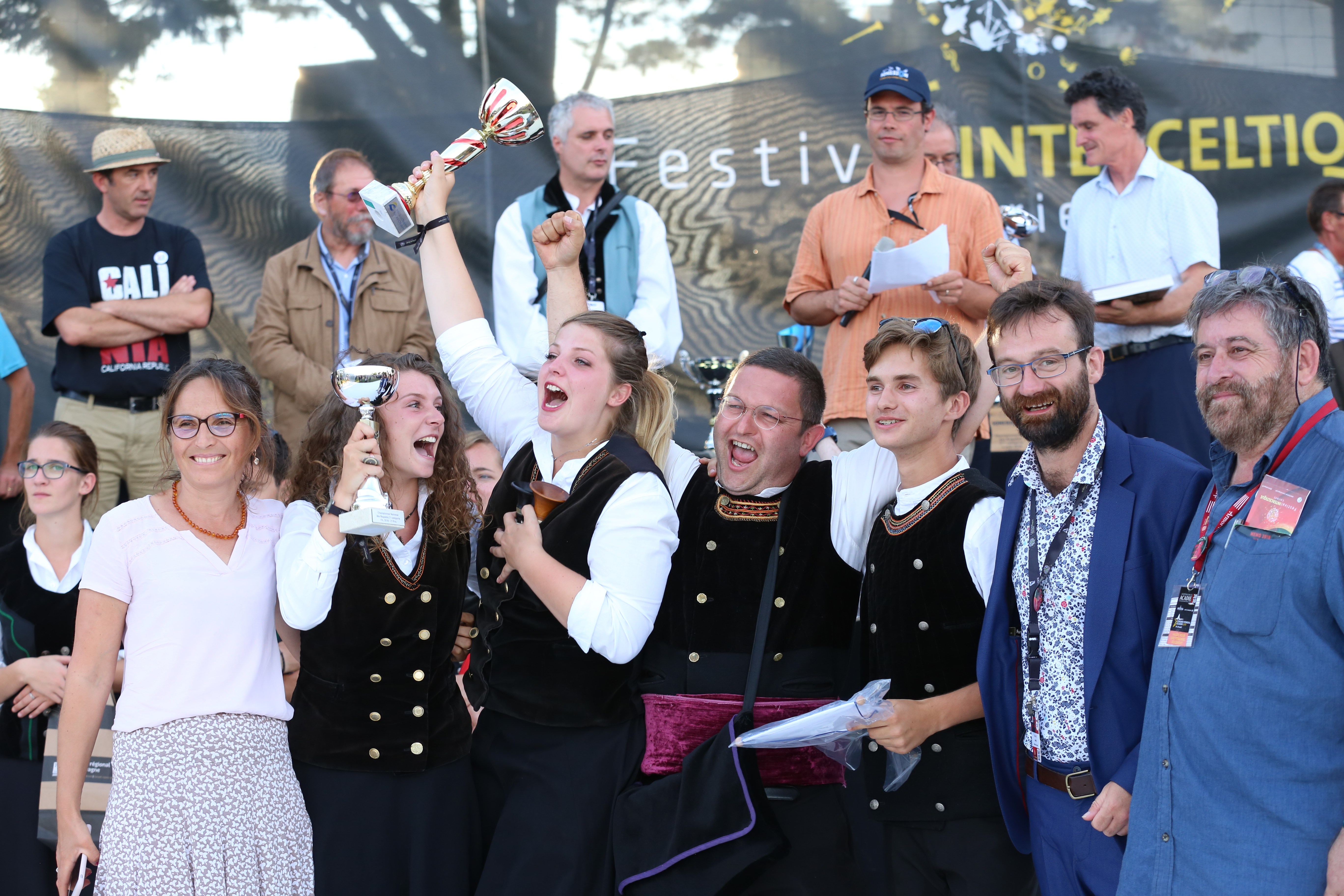 Annonce des résultats et remise des prix du championnat national des bagadoù 2018 (2e et 4e catégorie) organisé par Sonerion dans le cadre du festival interceltique de Lorient le 4 août 2018.